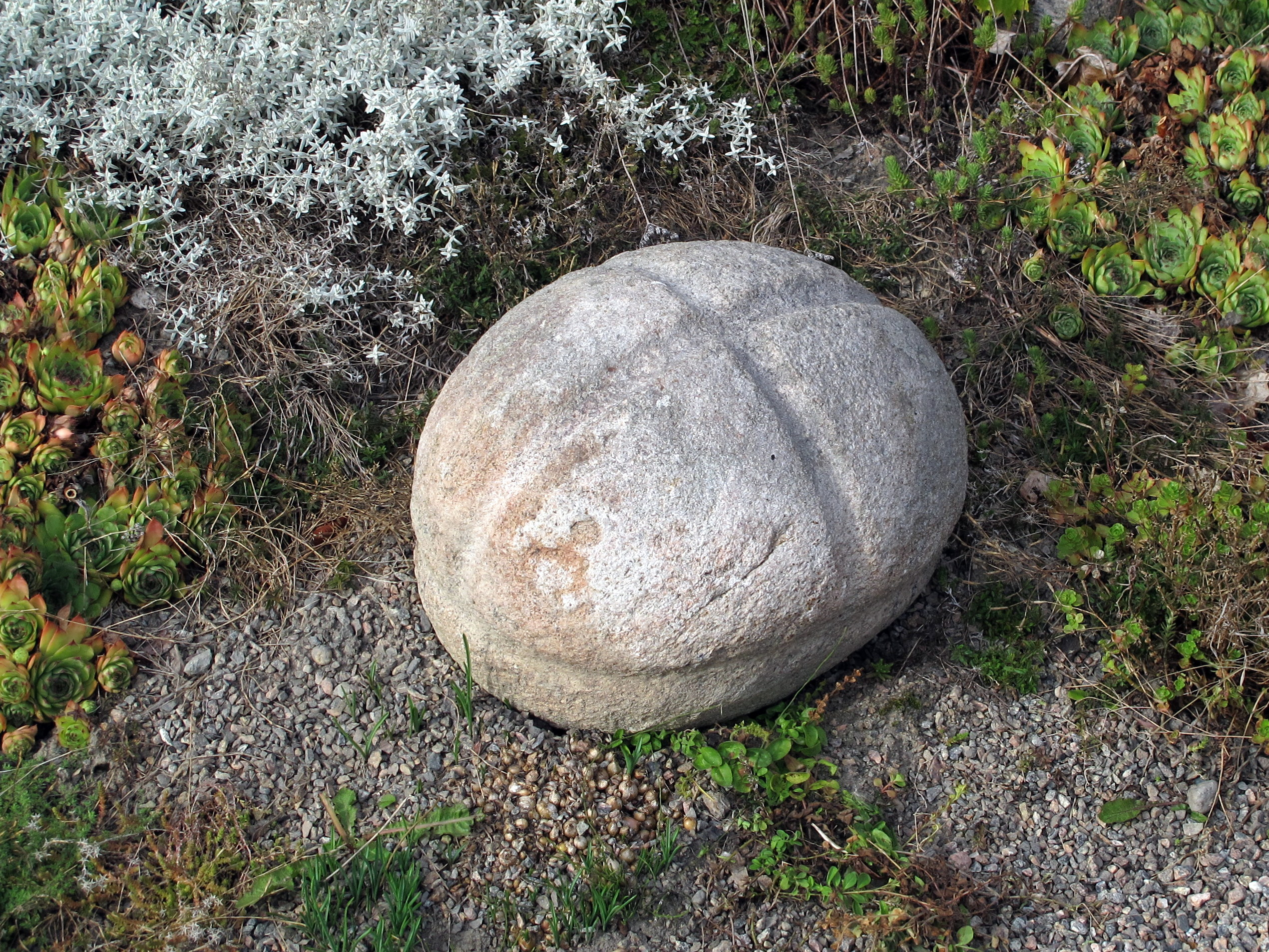 Hög 48:3